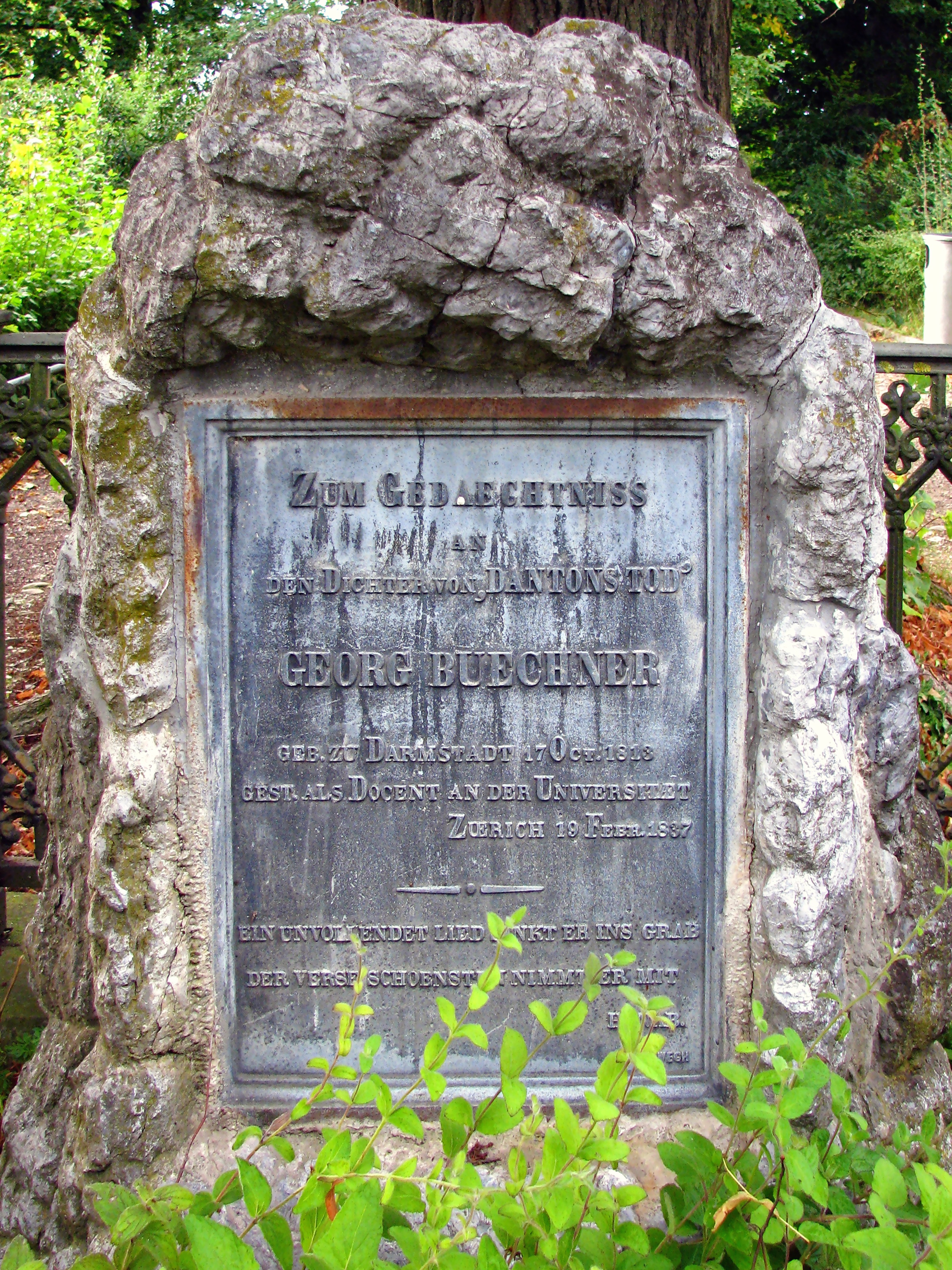 Grave of Georg Büchner on Germaniahügel in Zürich-Oberstrass